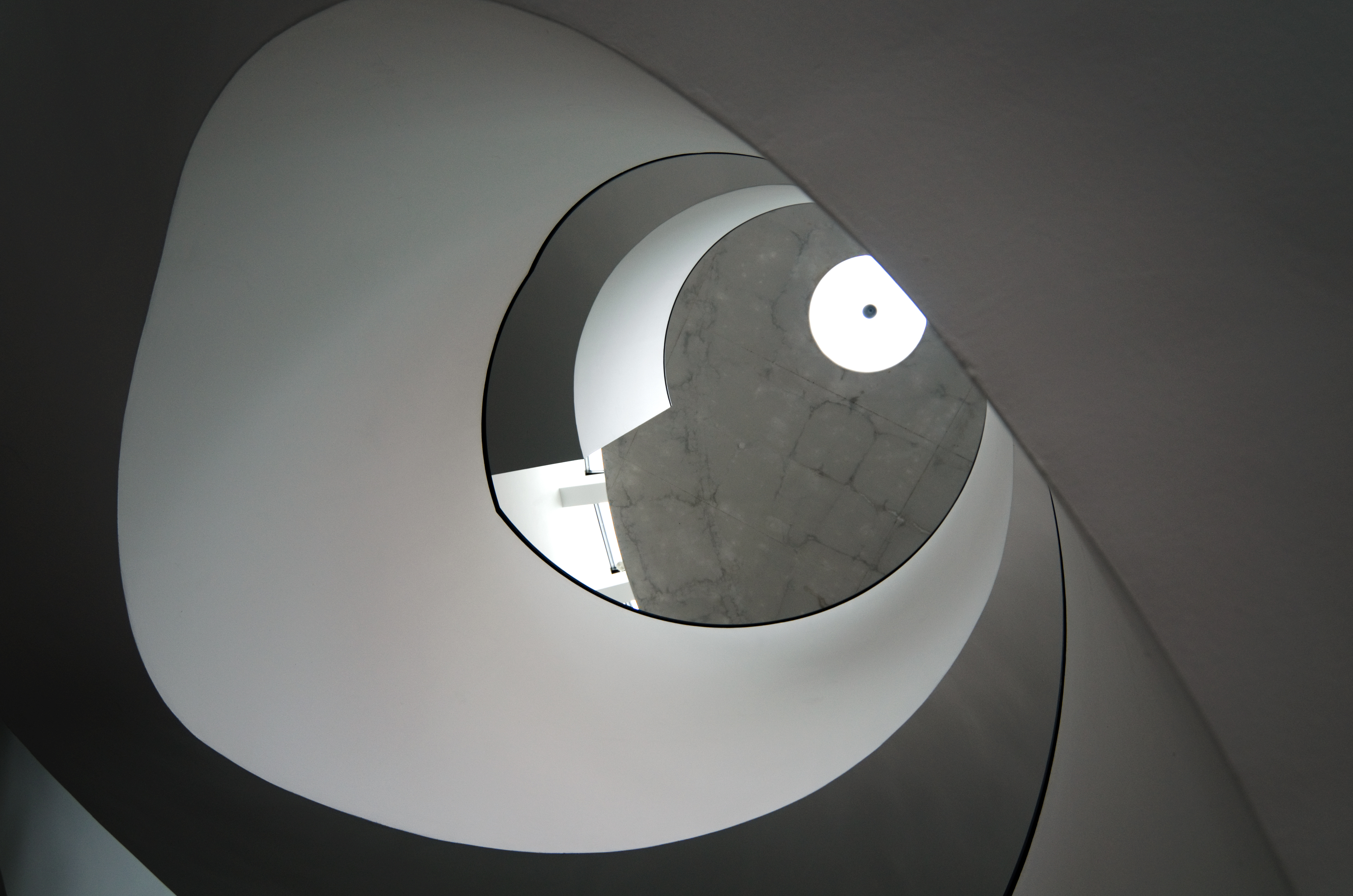 Wendeltreppe des Neuen Museum Nürnberg